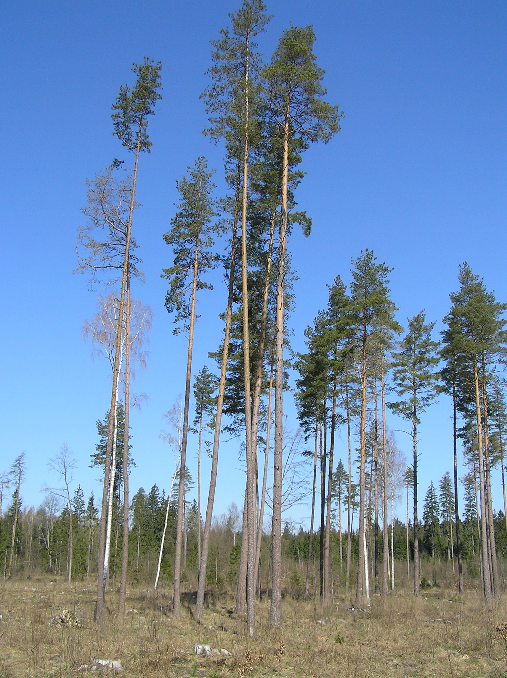 Grupa około 80 letnich sosen, na zrębie powstałym w wyniku usunięcia świerków zaatakowanych przez kornika drukarza. Białowieża forest, Polska